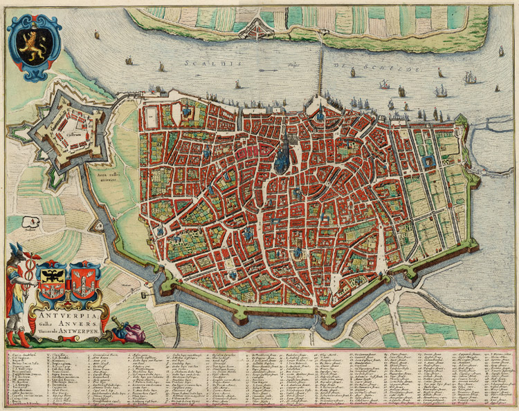 Title:Antverpia; Gallis Anvers. Vernacule Antwerpen